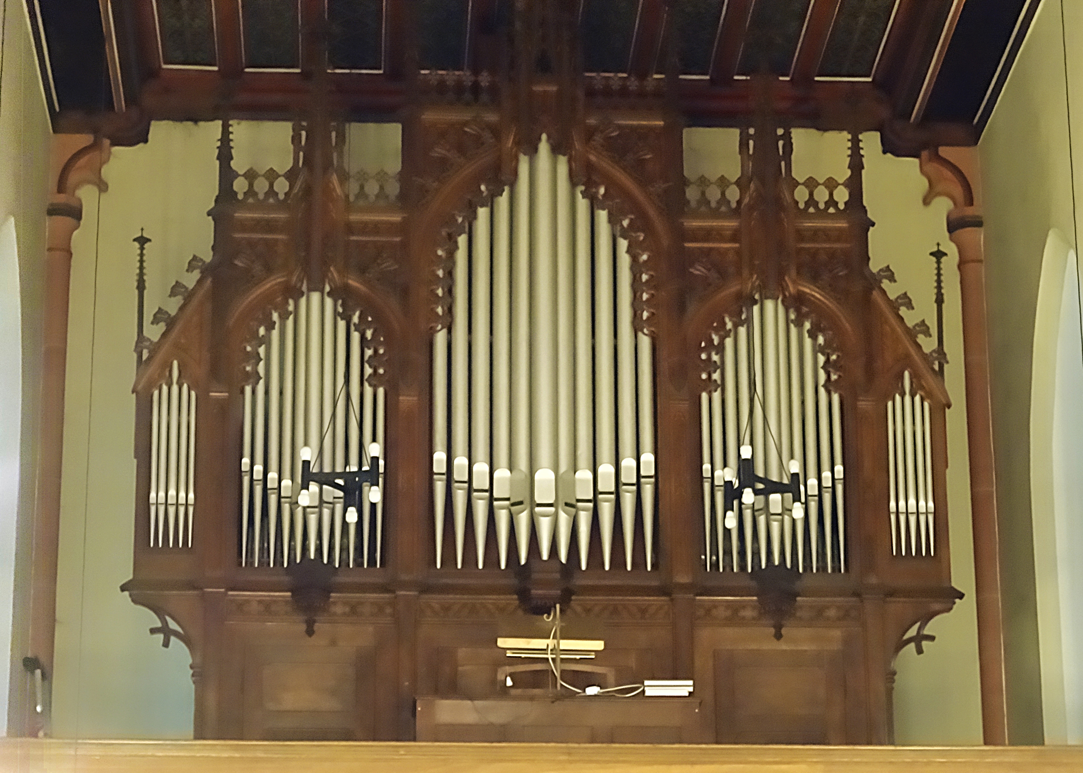 Orgel von Martin Joseph Schlimbach (1895, IIP/22) in der Pfarrkirche St. Bonifatius Apolda